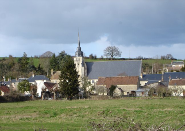 Photo du village de Sougé (Loir-et-Cher) prise le 23 février 2005 par Antoine Richard